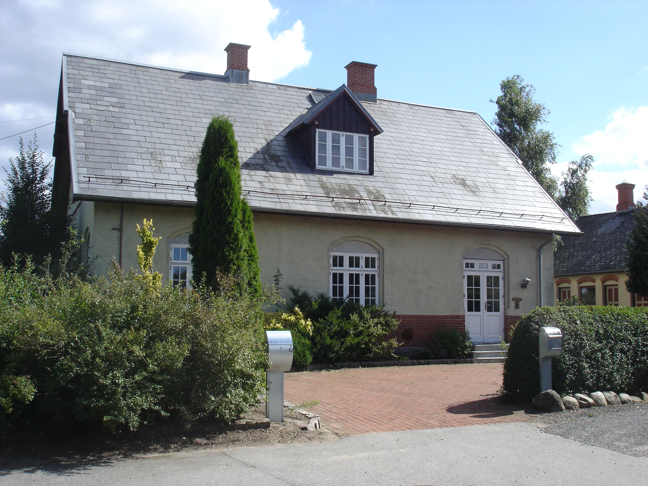 Ilskov Station fra vejsiden